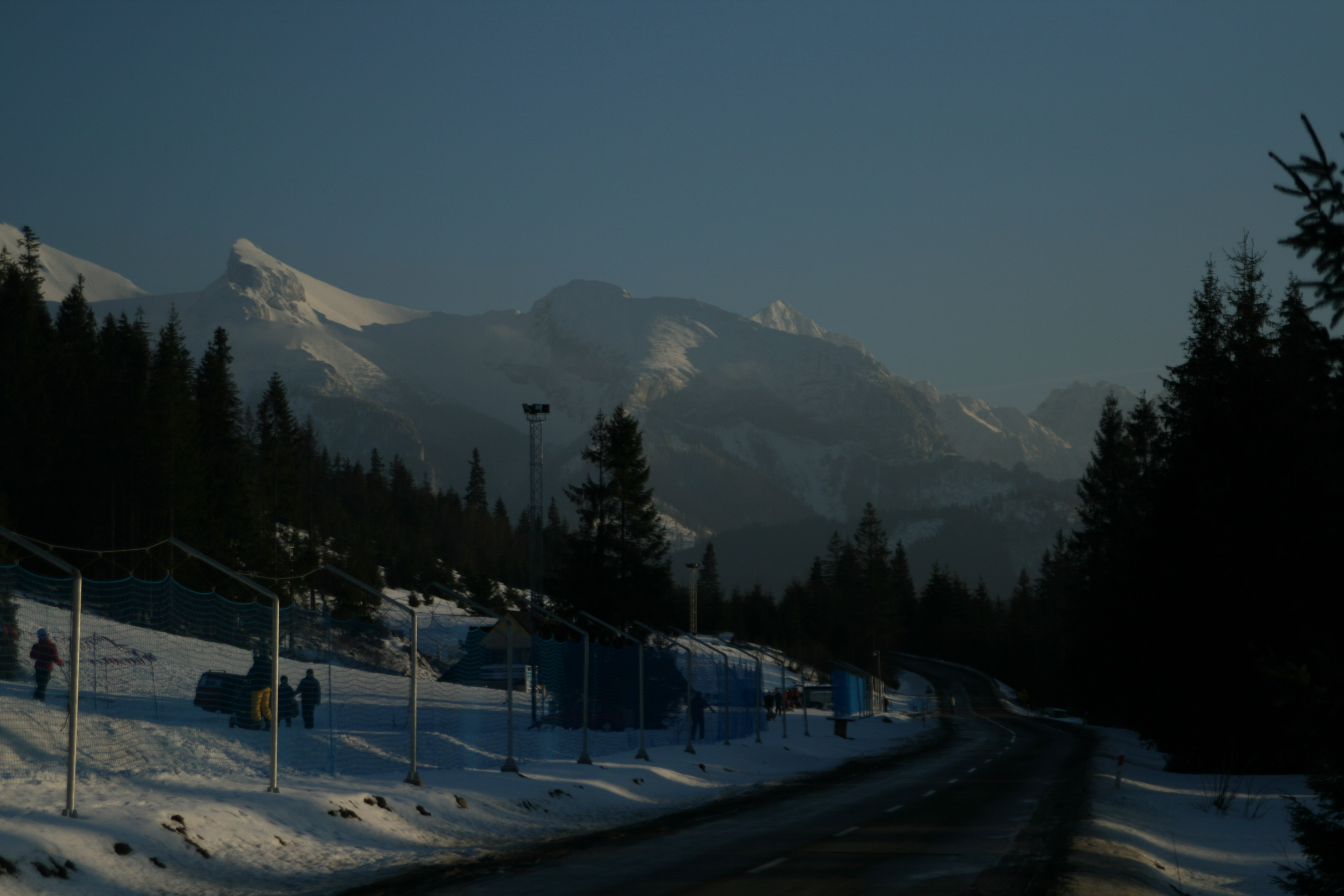 Widok na Tatry. Jurgów. Przy wyciągu.